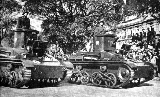 Аргентинские танкетки Vickers M1934